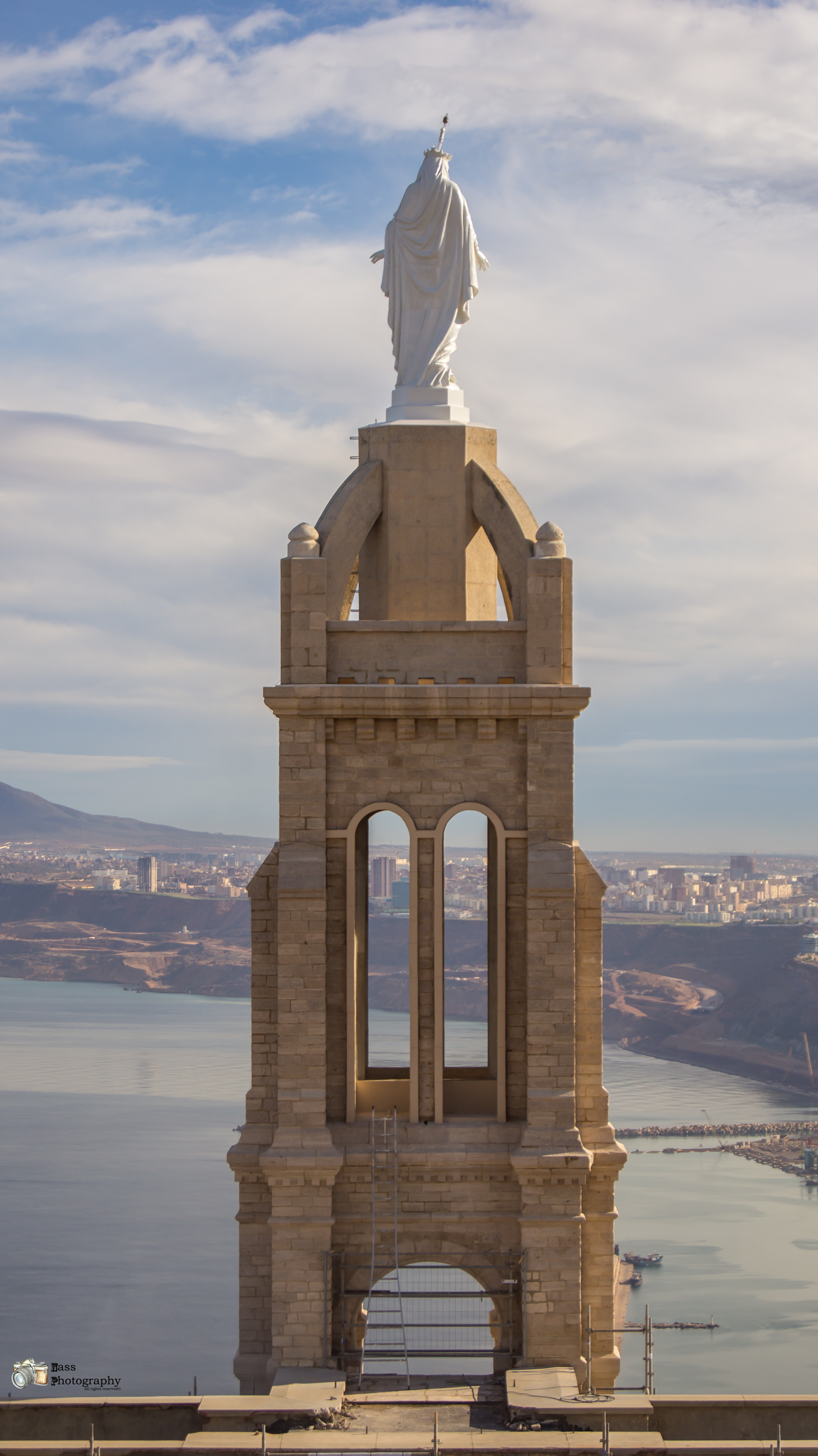 Notre dame de Santa Cruz tout juste rénovée